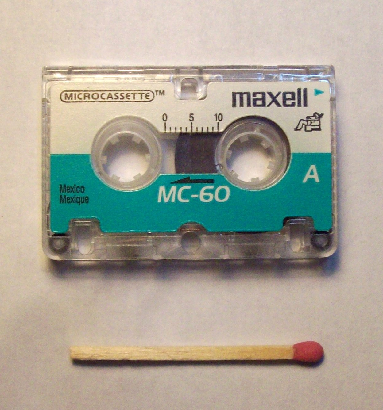 Es una foto de un microcasete con un fosforo avajo para mostrar el tamaño.